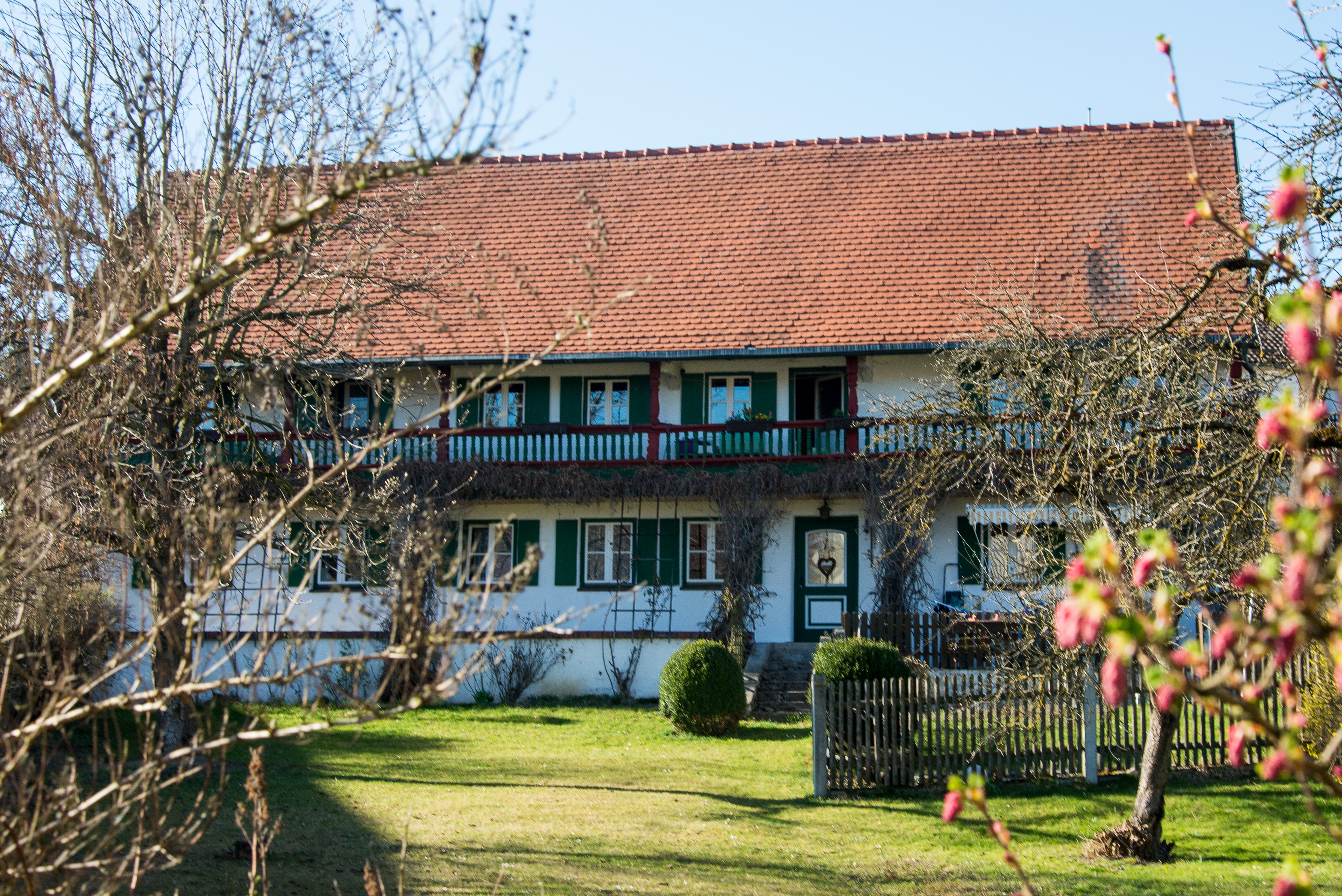 Bauernhaus, zweigeschossiger Satteldachbau mit Traufschrot, wohl 19. Jahrhundert. This is a photograph of an architectural monument.